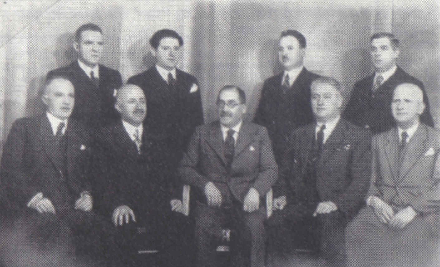 מושב הקונסיסטוריה היהודית של בולגריה ב-1935 צולם בידי אלמוני